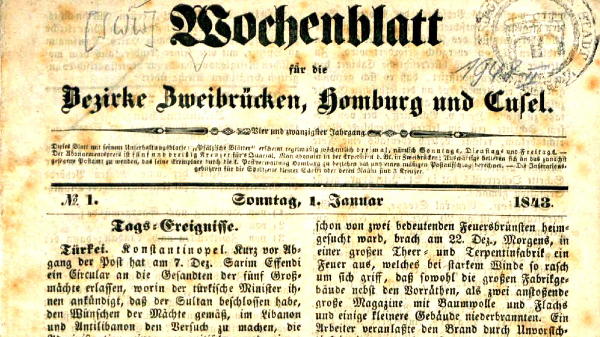 Titel des Wochenblatts für die Bezirke Zweibrücken, Homburg und Cusel vom 1. Januar 1843. Redaktion, Druck und Verlag von G. Ritter